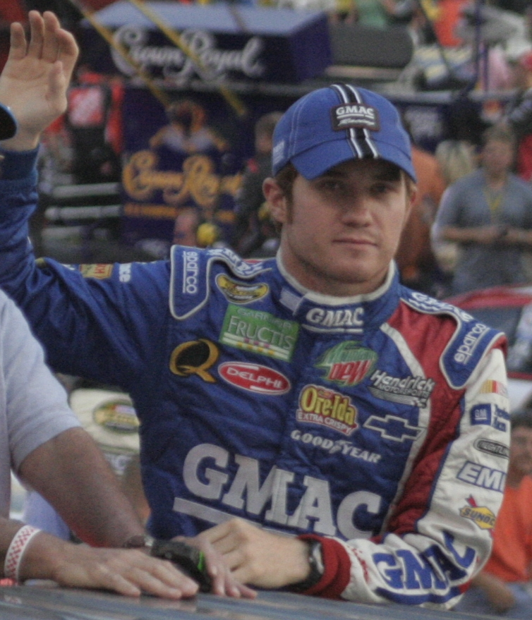 Brian Vickers in August 2006.